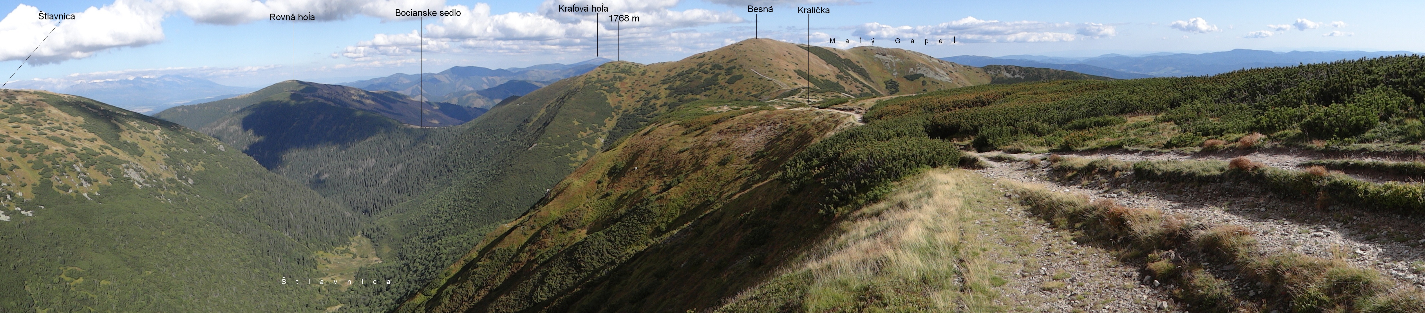 Štiavnica (valley)